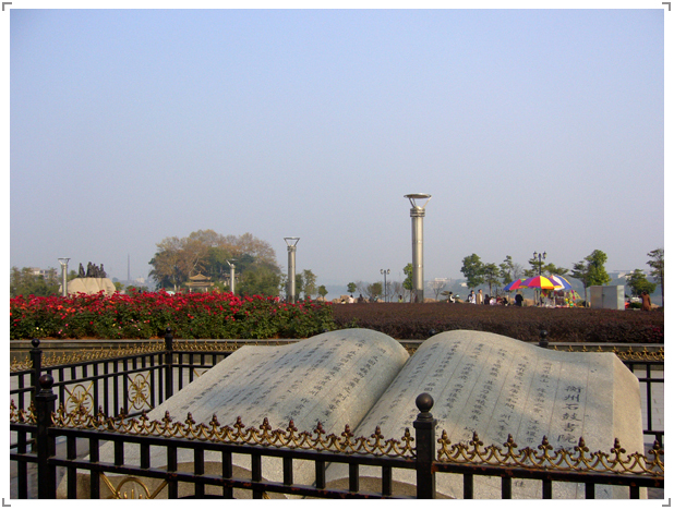 位于石鼓书院前